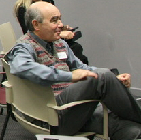 Amatiño 2010ean.